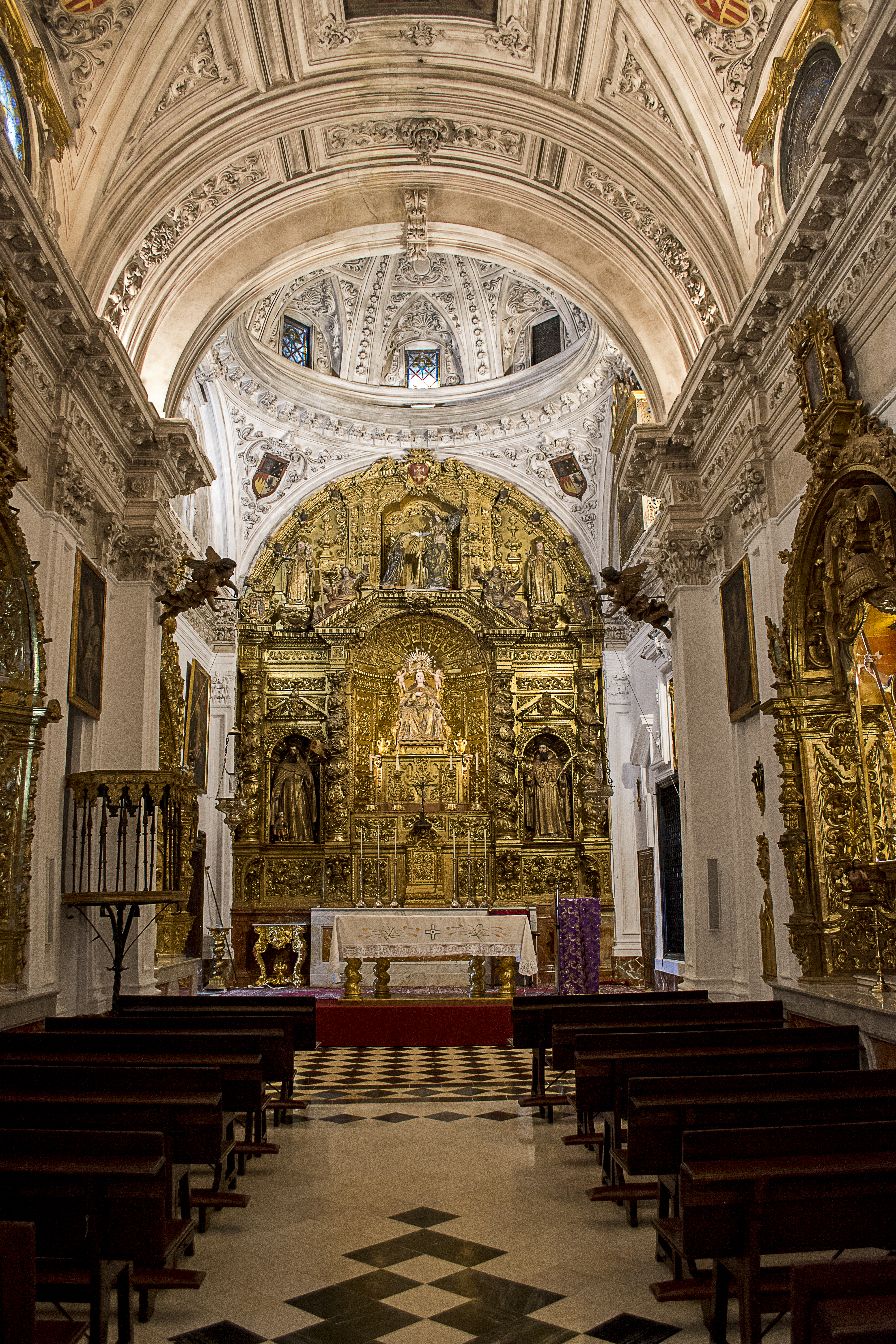 Iglesia del convento de la Encarnación de Osuna.